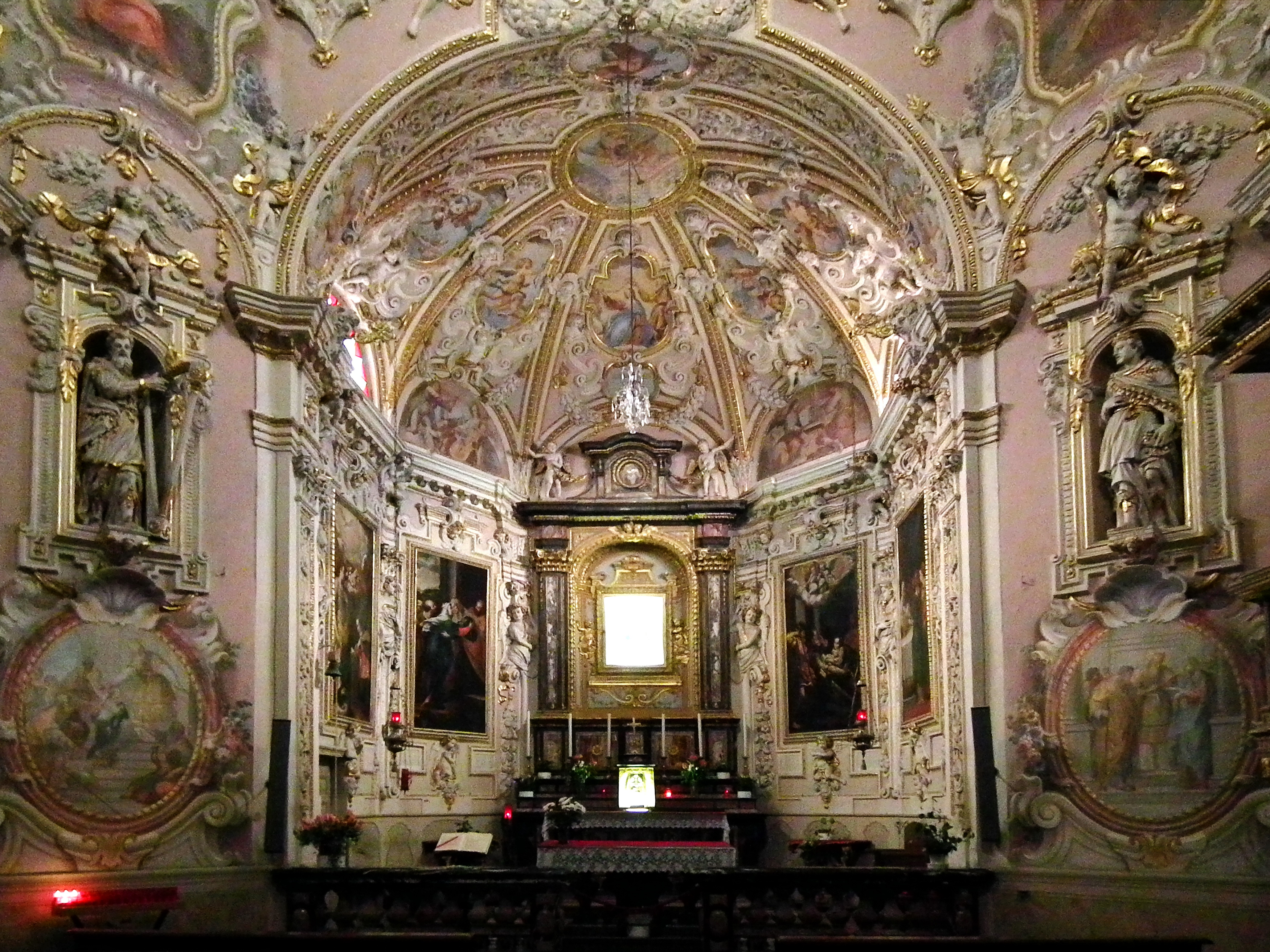 Santuario della Beata Vergine del Fiume Native nameSantuario della Beata Vergine del FiumeLocationMandello del Lario, Lombardia, ItalyCoordinates45° 54′ 55.63″ N, 9° 19′ 02.75″ E